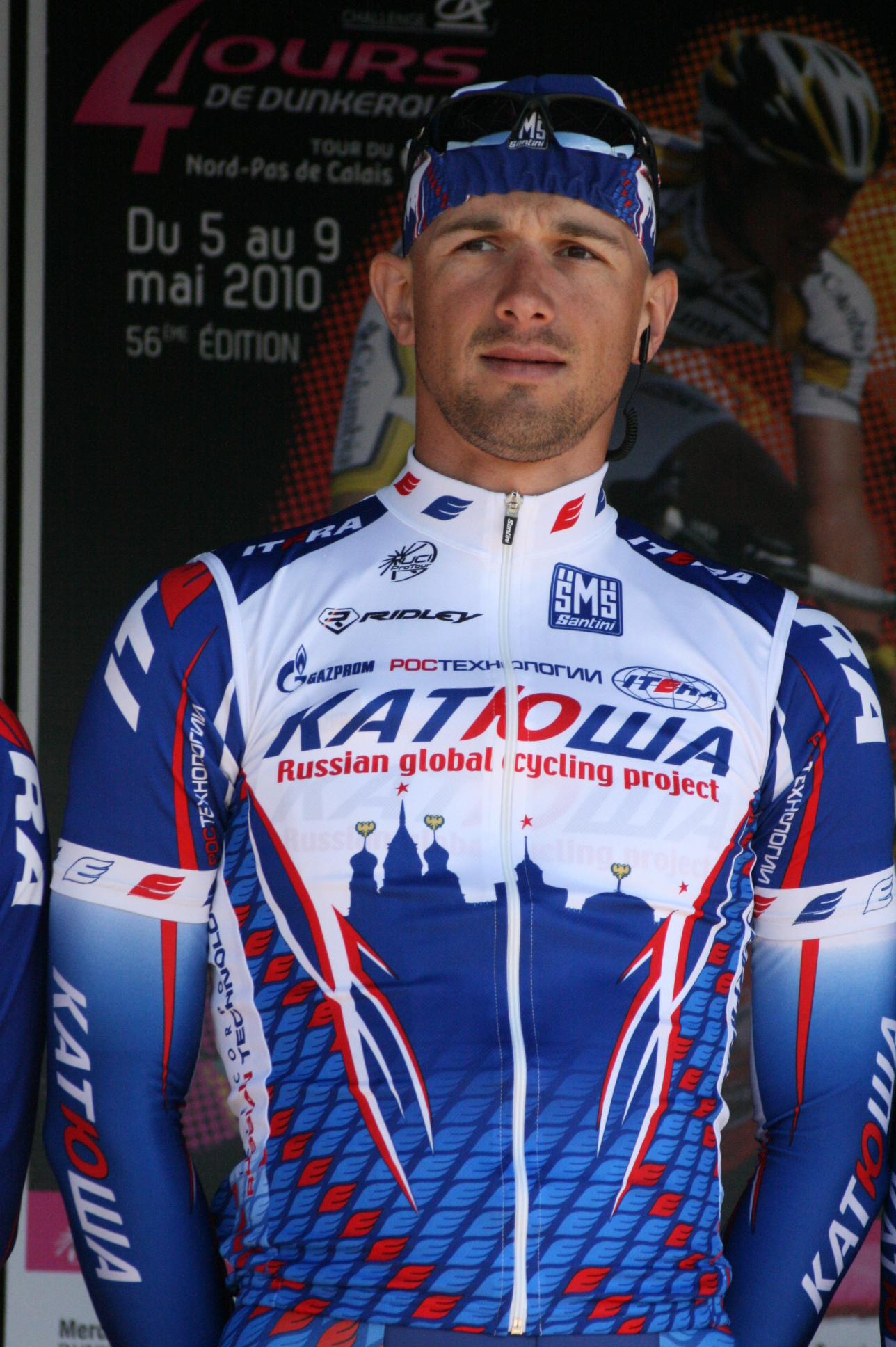 László Bodrogi lors de la présentation des équipes des 4 jours de Dunkerque